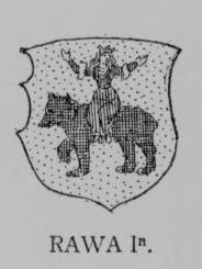 Rawicz In